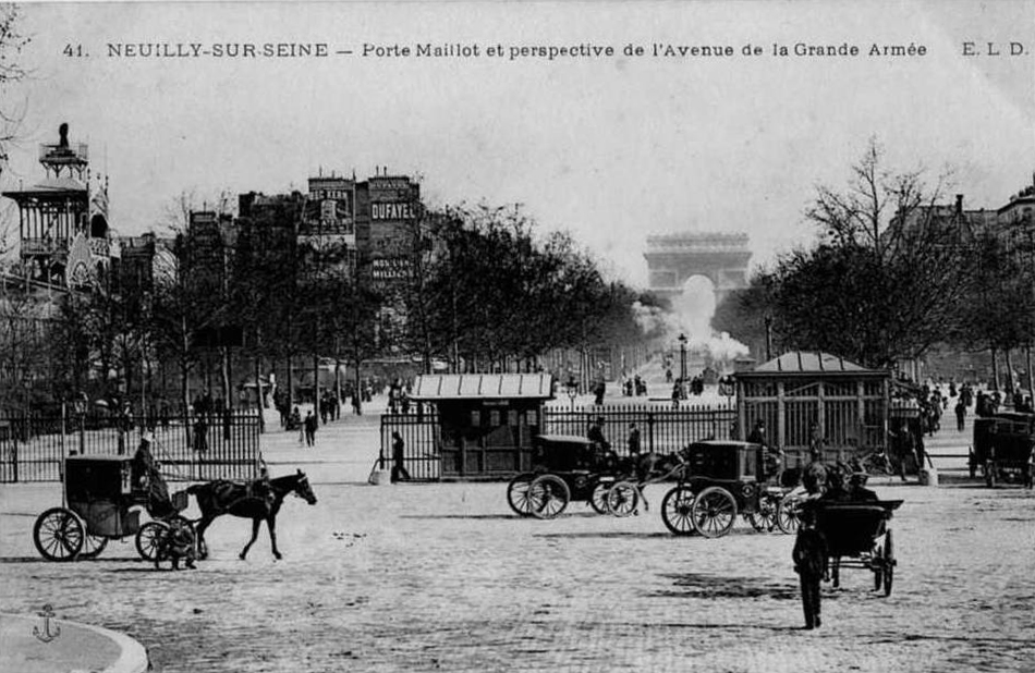 porte de Neuilly- avenue de la Grande-Armée; à gauche, entrée du Printania music-garden inauguré en 1904 et remplacé en 1908/1909 par le Luna Park